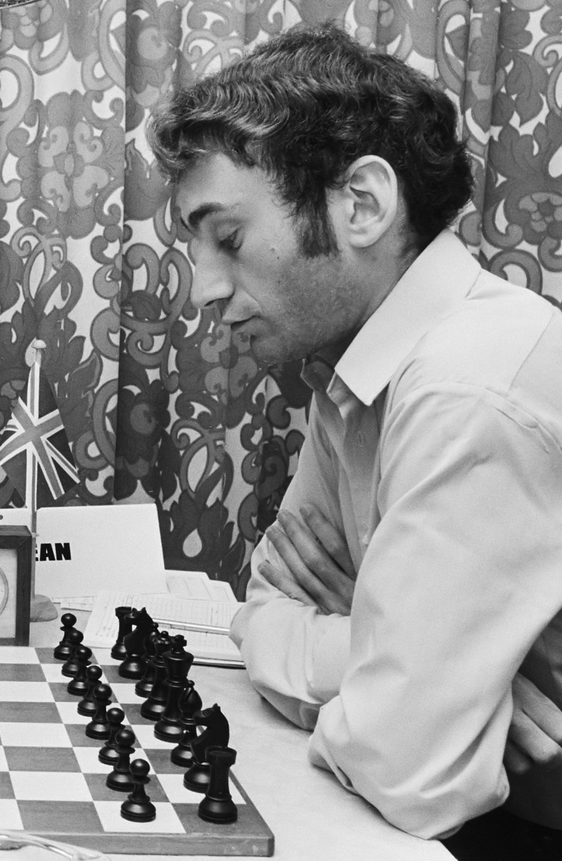 Zoneschaaktoernooi Amsterdam; Stean 27 november 1978